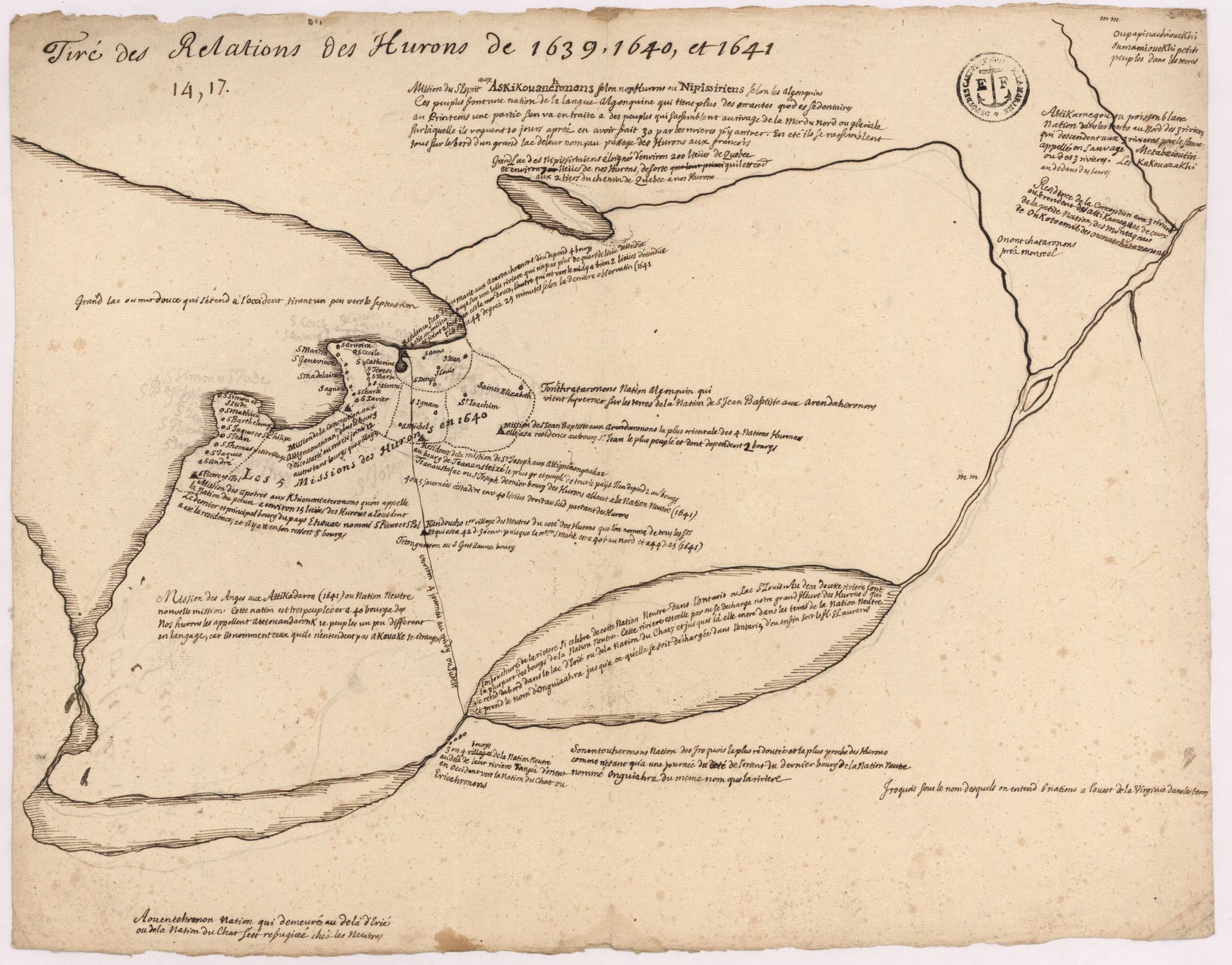 Title: "Tiré des relations des Hurons de 1639, 1640 et 1641"Reference:MARINE JJ/6/75 pièce 177 FRCAOM_Canada001_FRDAFANCH00NT_CHMARINE6JJ75PIECE177